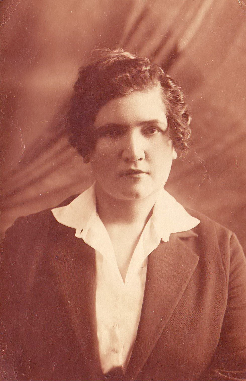 Maria Cicherschi Ropala octombrie 1923 la Iași